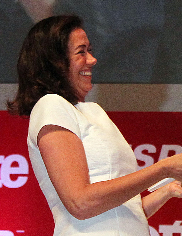 Presidente Dilma Rousseff entrega o Prêmio " Personalidade do ano na televisão", à atriz Lilia Cabral promovido pela revista Istoé Gente. (São Paulo-SP, 06/12/2011)